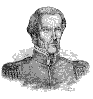 Martin Jacobo Thompson, Capitan de puertos